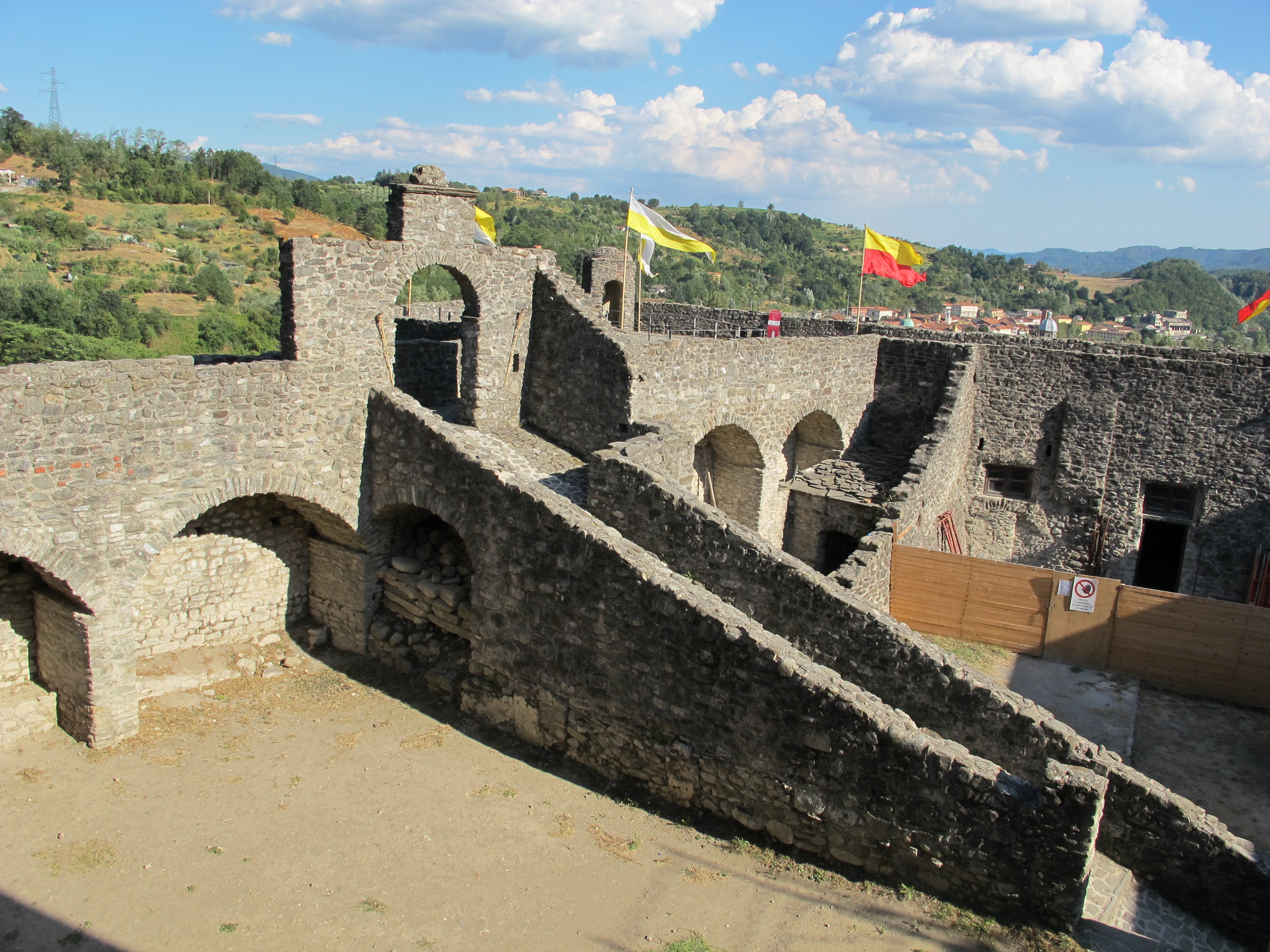 Castello di pontremoli, cortile